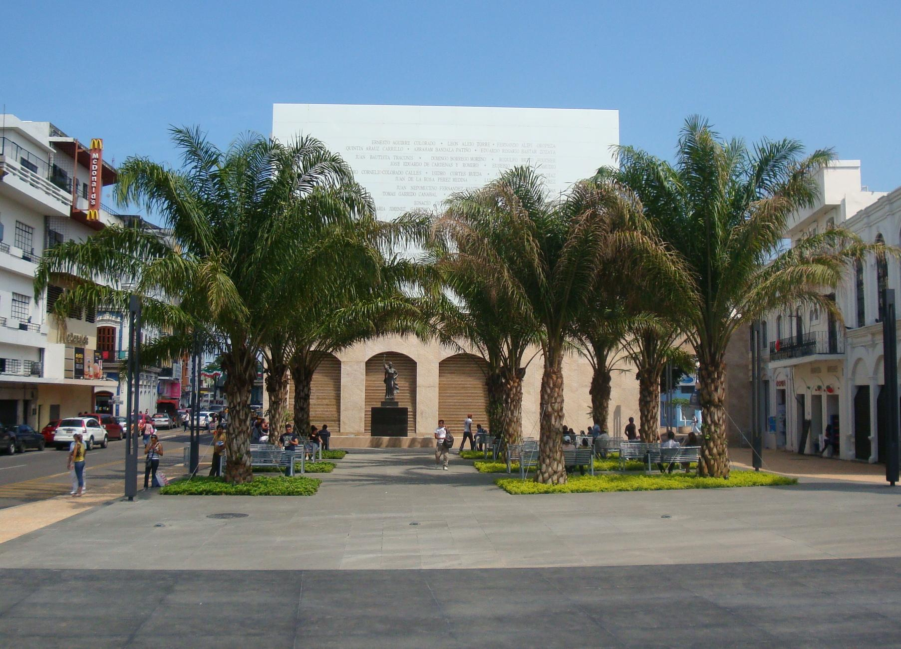 Plaza de la Corregidora, en el centro histórico de la ciudad de Villahermosa, Tabasco, México.